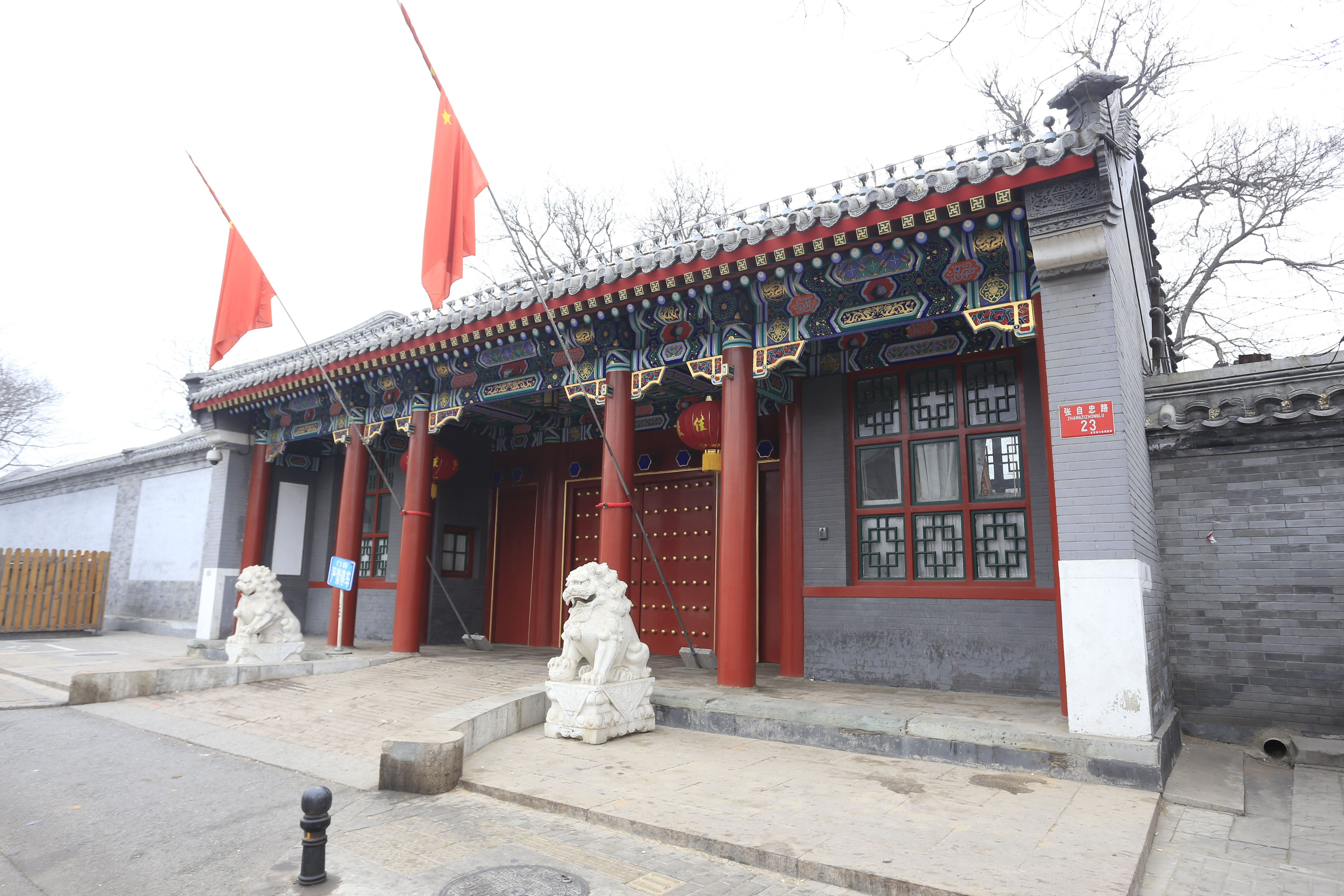 北京孙中山行馆,，位于北京市东城区张自忠路23号